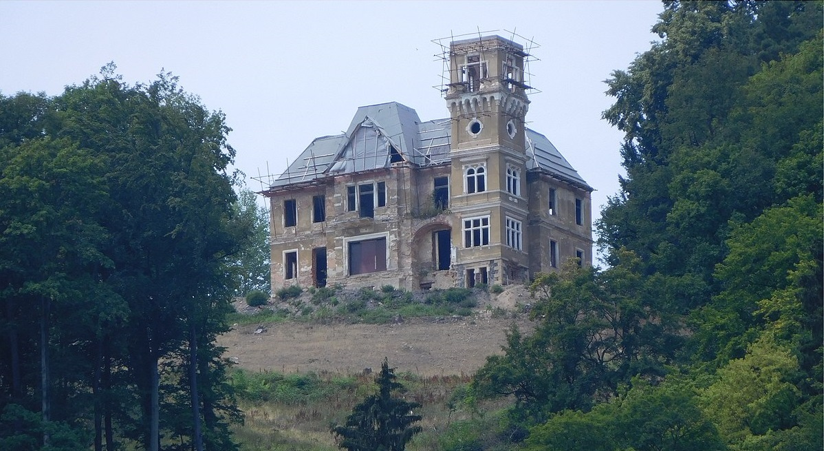 Fotografie pořízená ze silnice II/261 z obce Těchlovice u Děčína dne 22.7.2018 Vyobrazuje aktuální pohled na stav rekonstrukce vily - zámečku Skrytín.